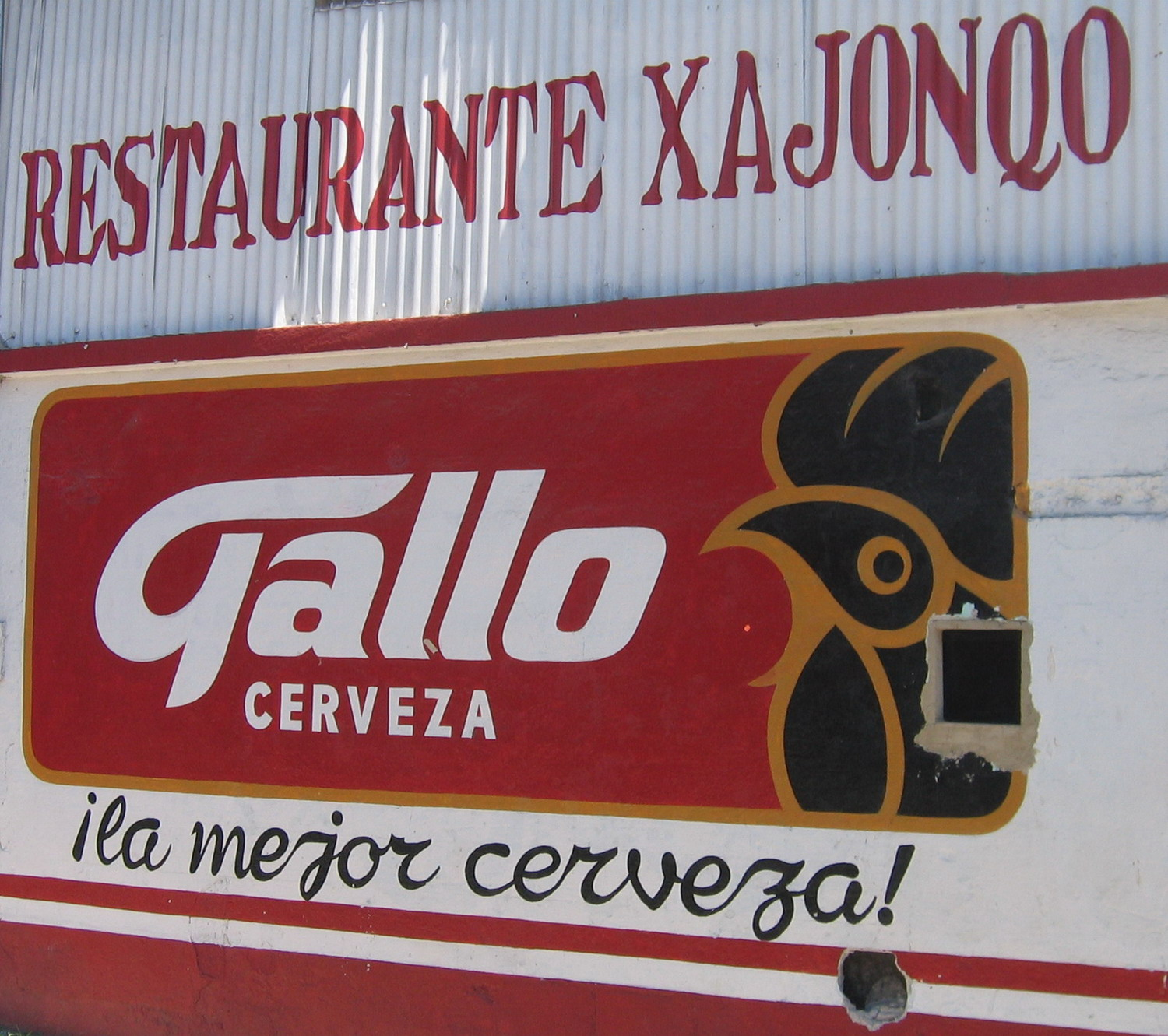 A Gallo sör reklámja (Guatemala)